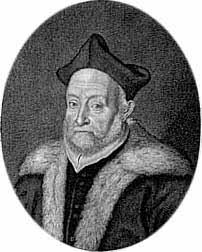 Michele Mercati von Petrus Nellus, Kupferstich (aus der Metallotheca), vor 1717, Privatbesitz